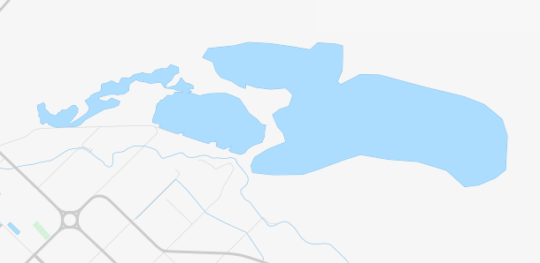 Mapa de las lagunas del ornitólogo.